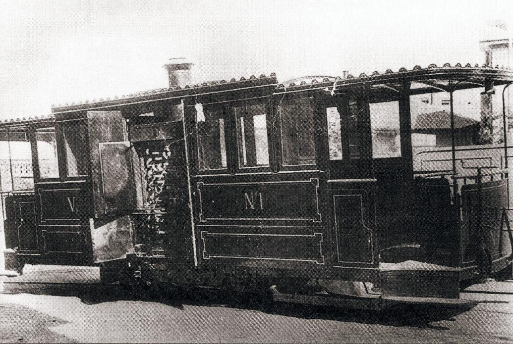 Automotrice Serpollet exposée à Genève